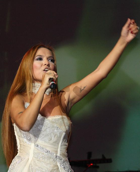 Turska pjevačica Demet Akalın